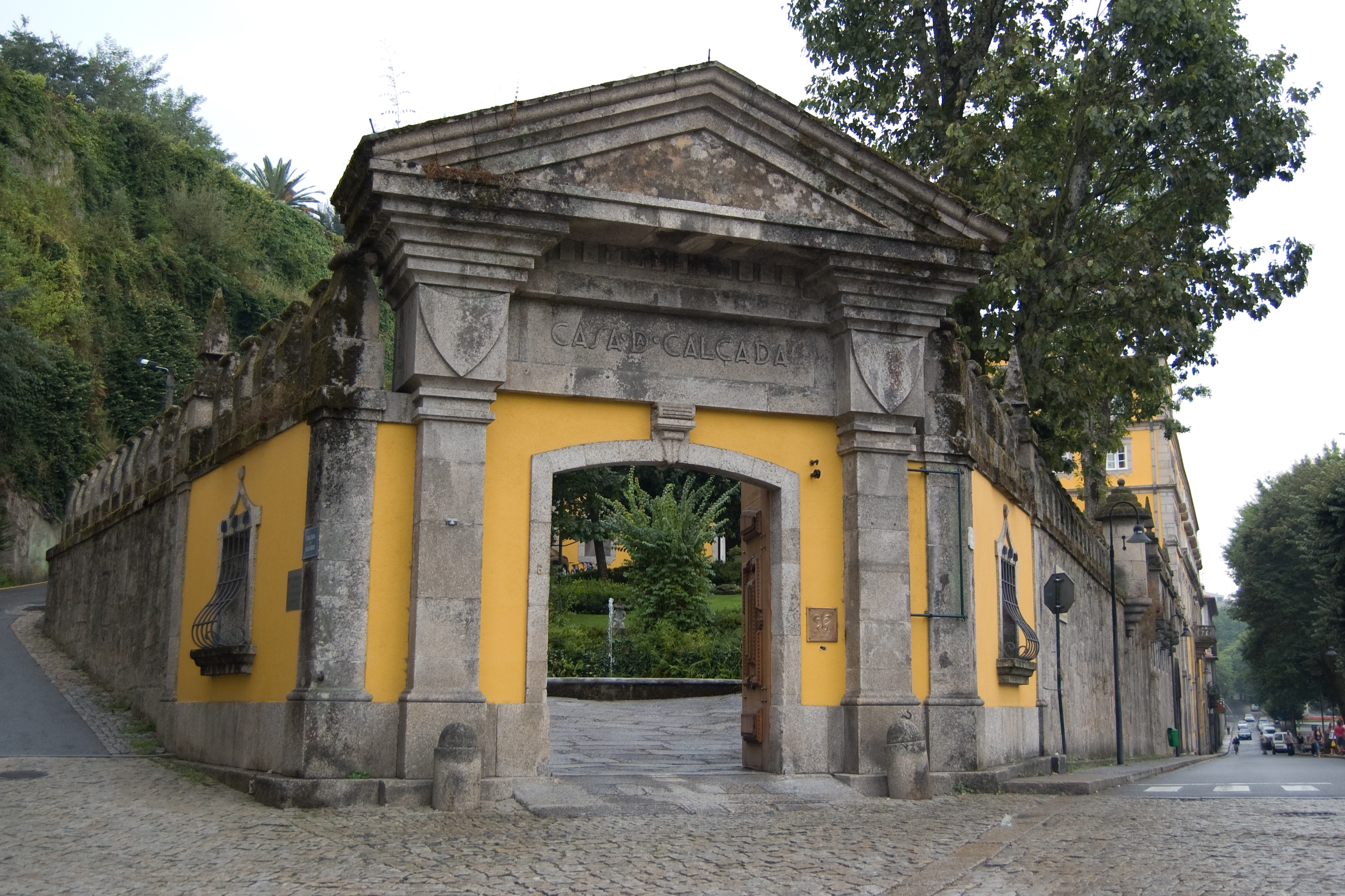 Amarante